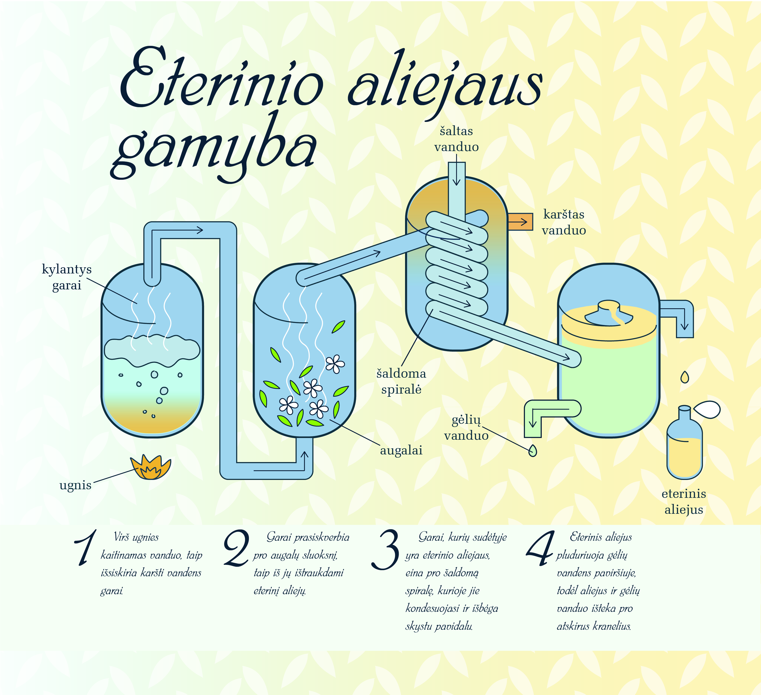 Eterinio aliejaus gamyba distiliavimo būdu.